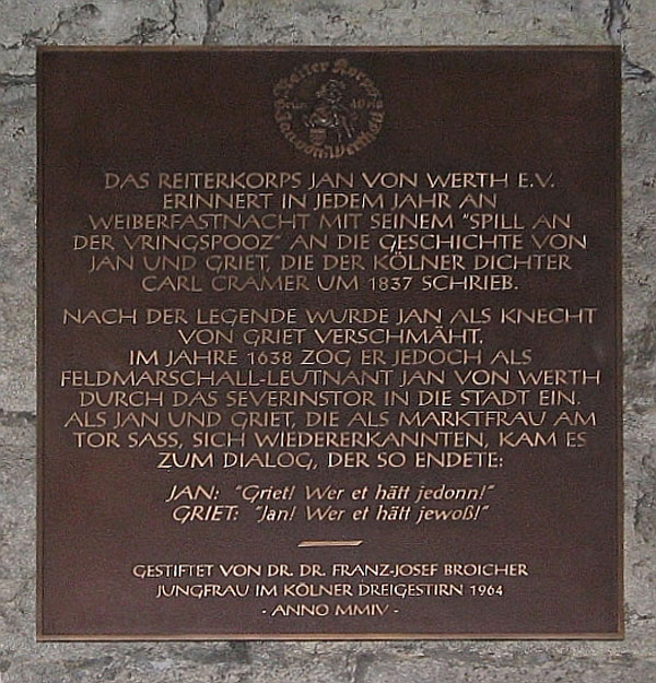 Schild an der Severinstorburg mit der Sage des Jan von Werth in Köln Erstellungsdatum: 29. 12. 04